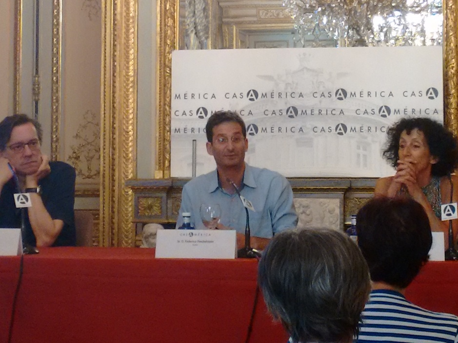 Presentación en la Casa de América de del fascismo al populismo en la historia